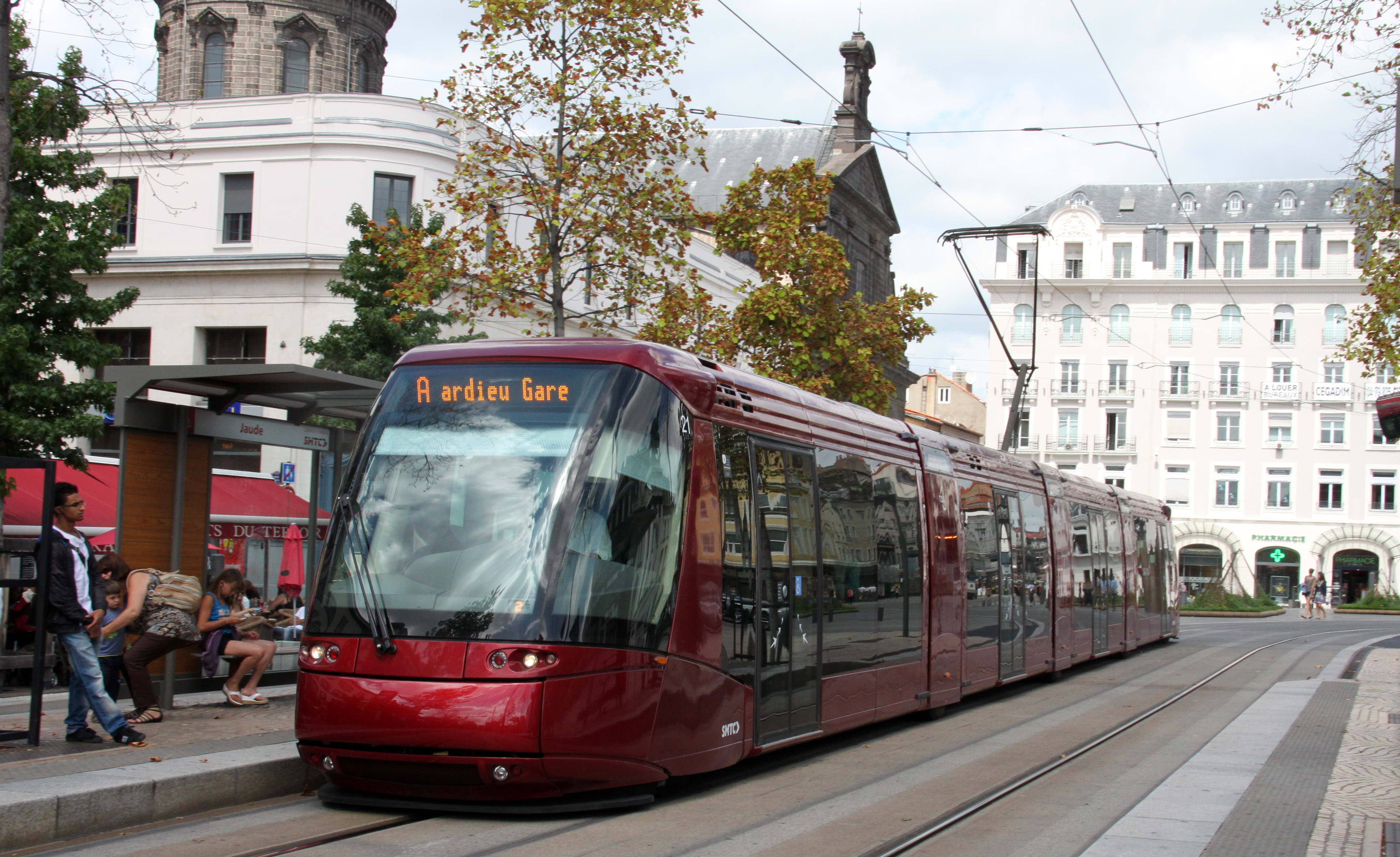 Een Translohr in het centrum van Clermont-Ferrand.